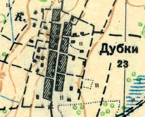 Топографическая карта Ленинградской области, квадрат О-35-9-Г-г (Косколово), деревня Дубки